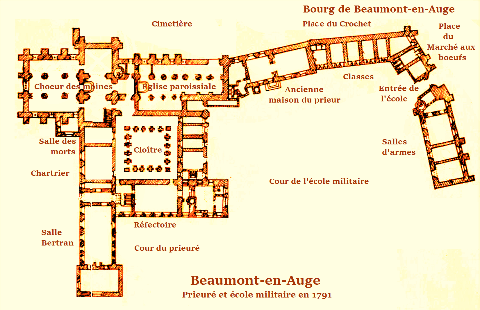 Beaumont-en-Auge, Calvados, Plan du prieuré et de l'école militaire en 1791 (image du domaine public retouchée)